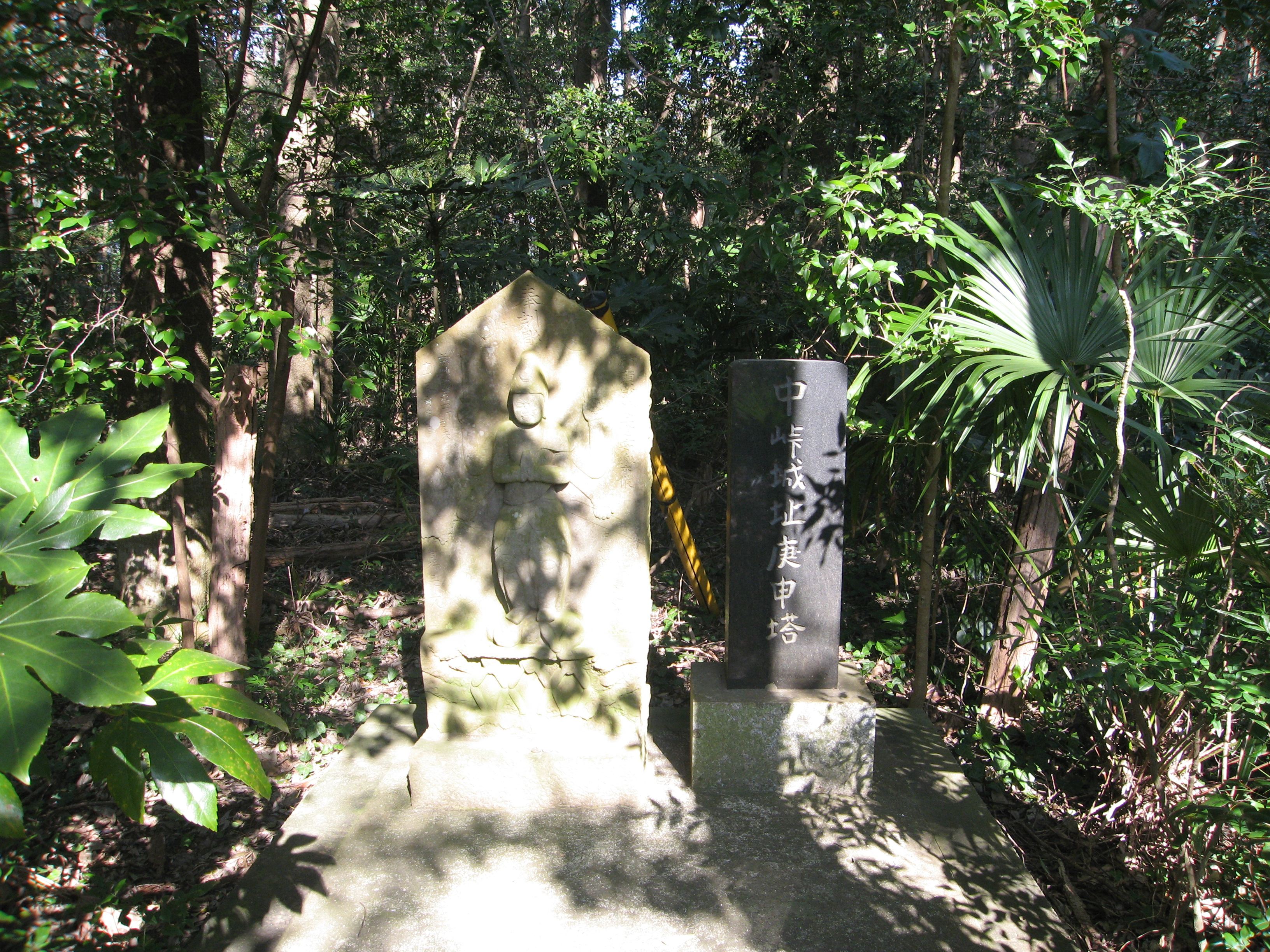 中峠城の庚申塔の写真